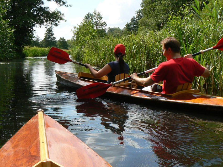 Bootshaus Kaupen - Paddelboot, Kajak, Paddeln im Spreewald - Quodda